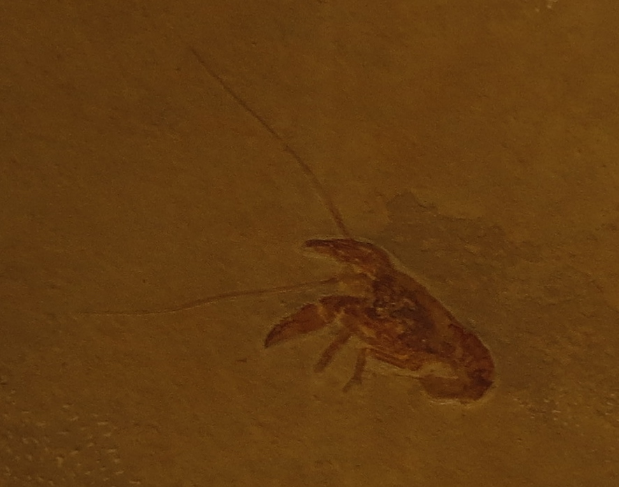 Fossil of Palaeastacus- Museo Paleontologico di Montecchio Maggiore